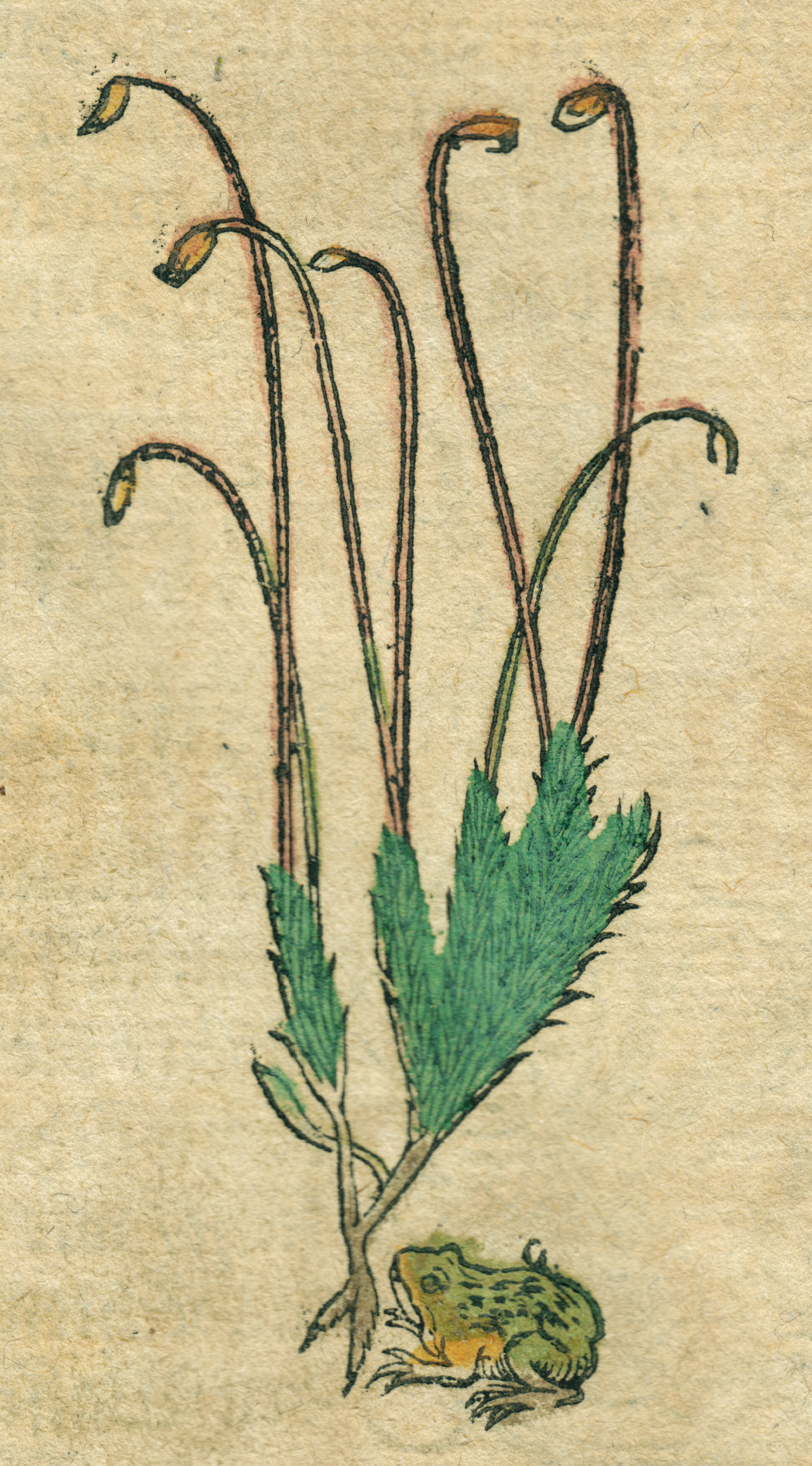 Abbildung von Polytrichum commune